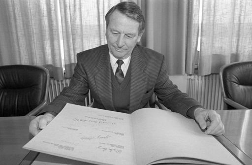 Alfred Pfeiffer, Bürgermeister der Gemeinde Planegg (Bayern) begutachtet die Unterschriften von Ehrengästen im Goldenen Buch der Gemeinde Planegg. Veröffentlicht in Münchner Merkur Nr. 94, 23. April 1992, Seite W1